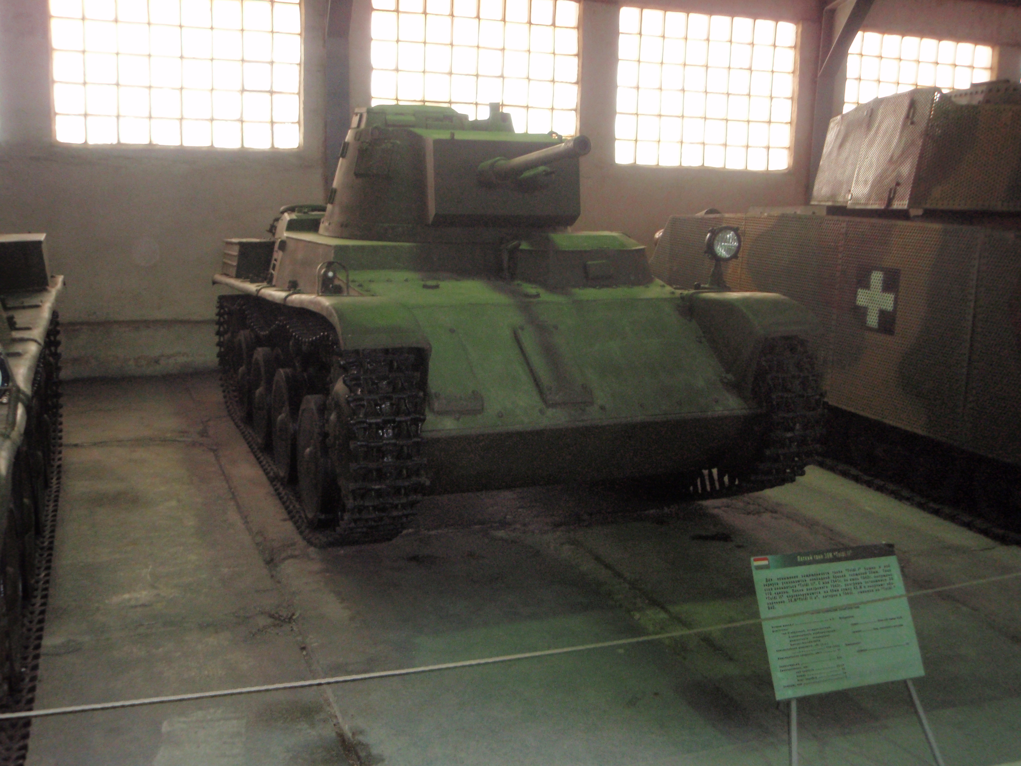 Венгерский лёгкий танк M38 (Toldi II) в Кубинке